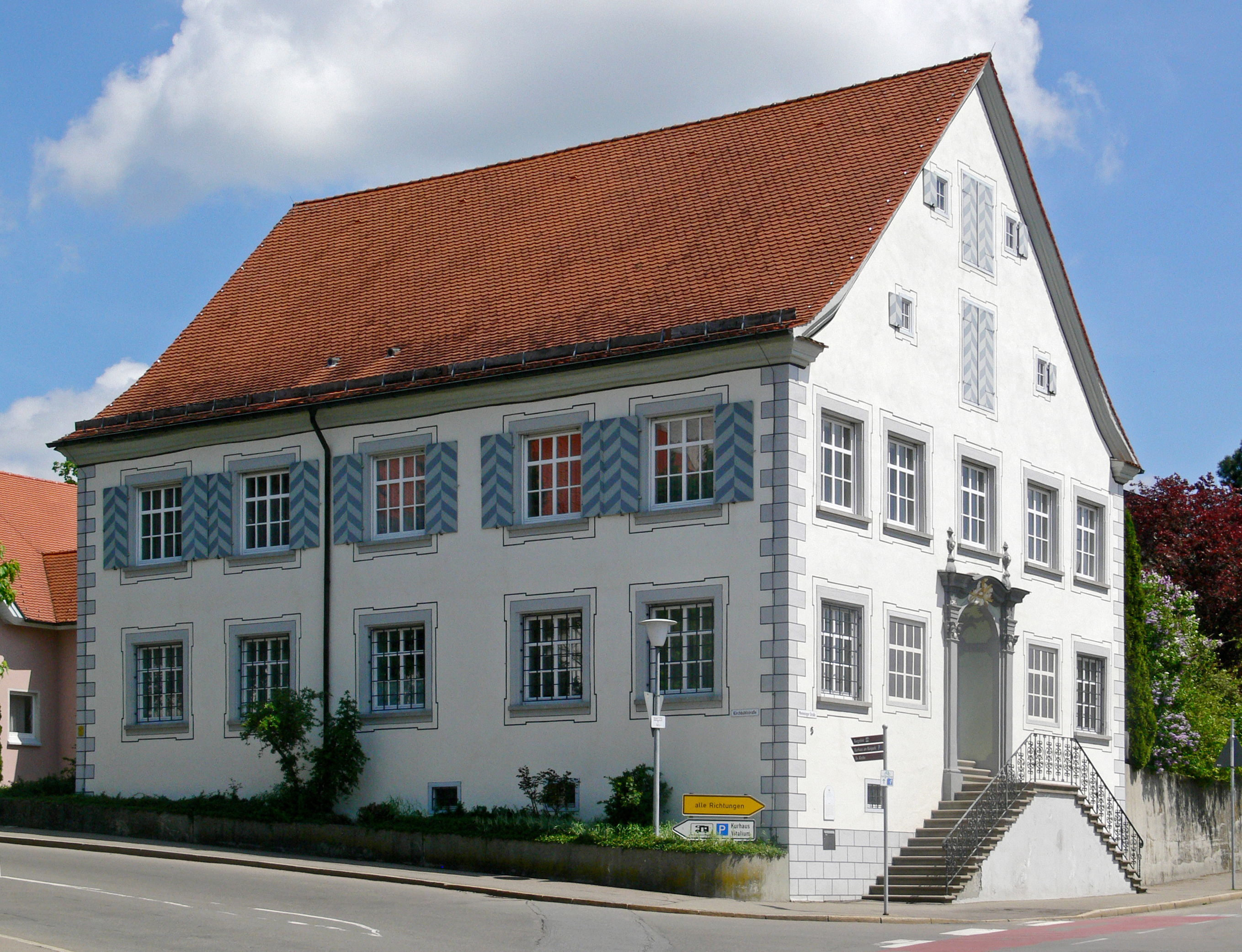 Bad Wurzach, Landkreis Ravensburg, Baden-Württemberg Pfarrhaus St. Verena